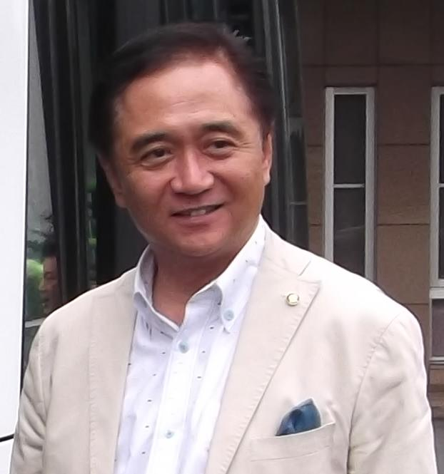 神奈川県知事黒岩祐治氏。横浜市鶴見区のふれーゆで開催された電気バス試乗会で撮影。